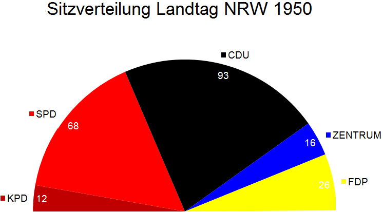 Sitzverteilung im Landtag Nordrhein-Westfalen nach der Landtagswahl in Nordrhein-Westfalen 1950